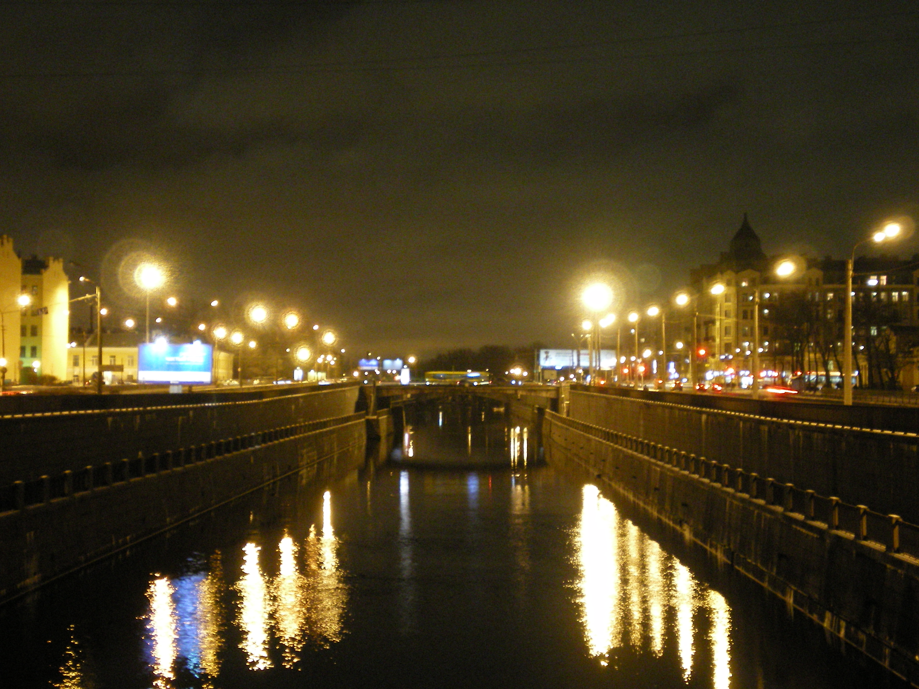 Новокаменный мост через Обводный канал в Санкт-Петербурге, вид вверх по течению